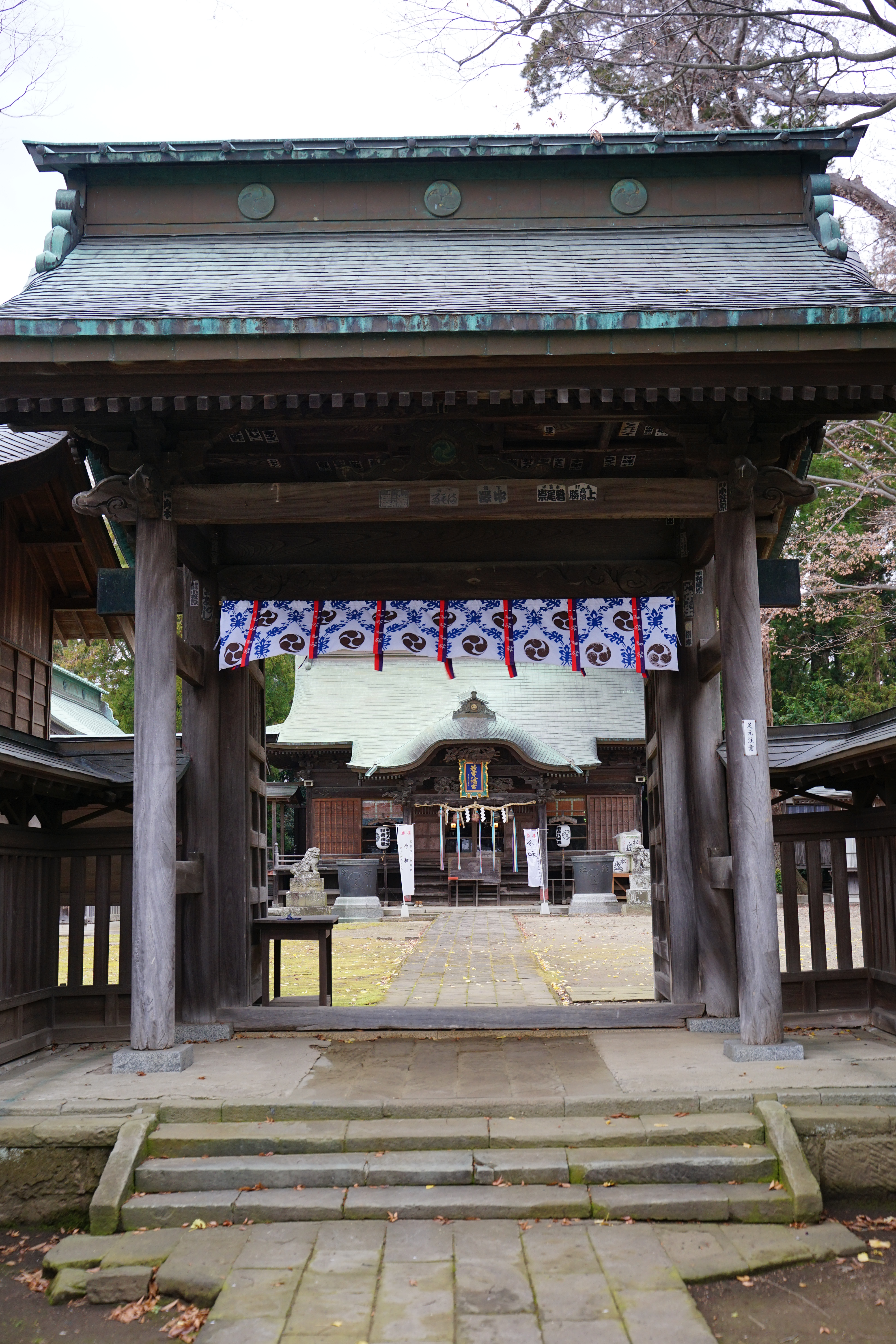 若宮八幡宮の神門（茨城県常陸太田市）